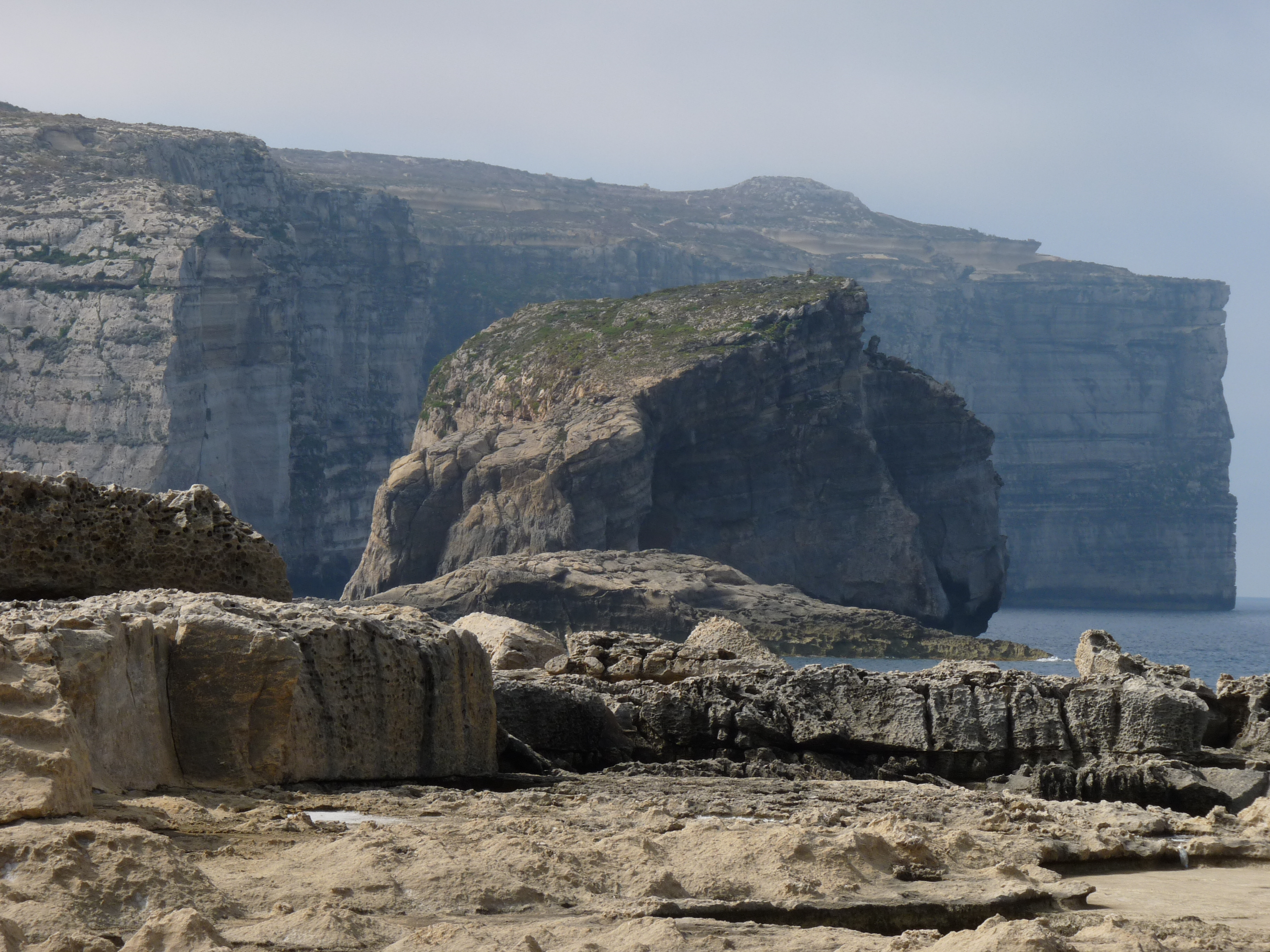 Fungus Rock, Gozo, Malta